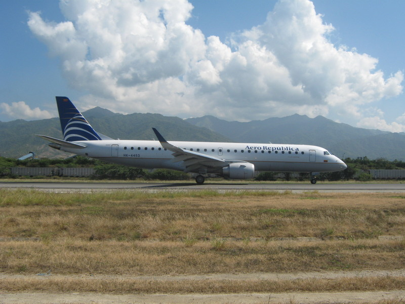 Embraer 190 de AeroRepública en el Aeropuerto Internacional Simón Bolívar de Santa Marta.